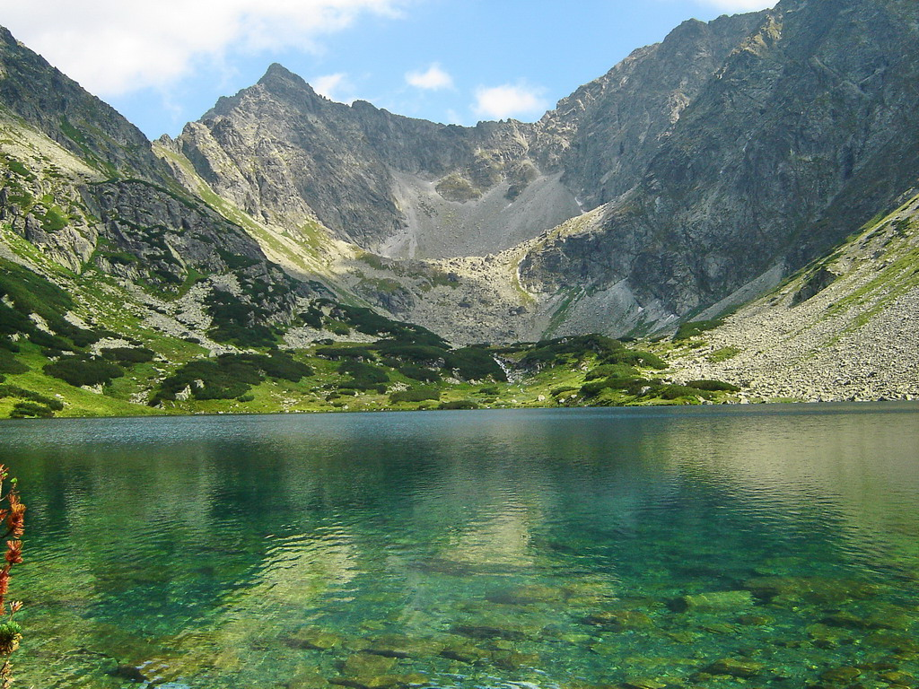 mountain lake